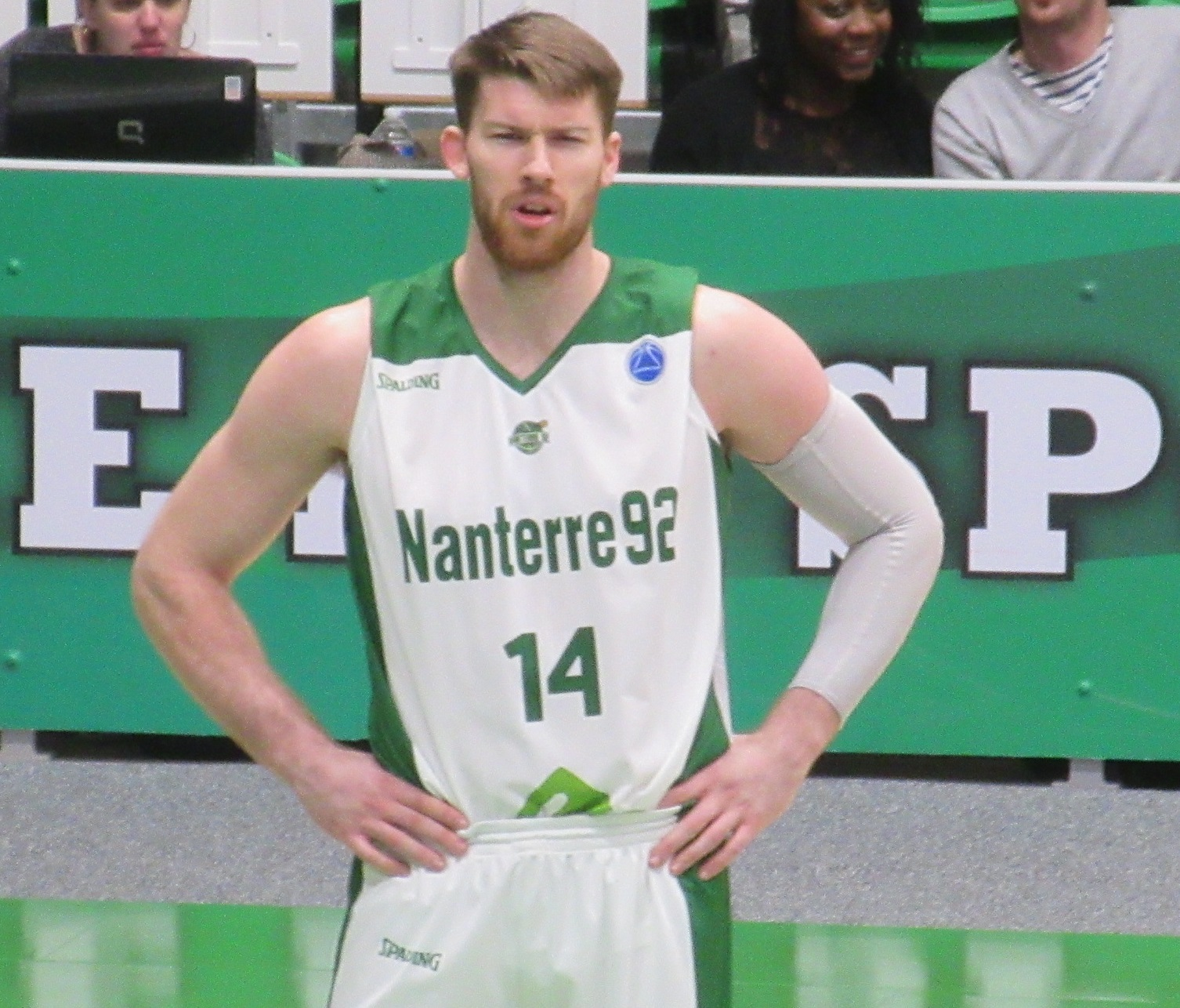 Brian Conklin avec le maillot de baksetball de Nanterre 92.